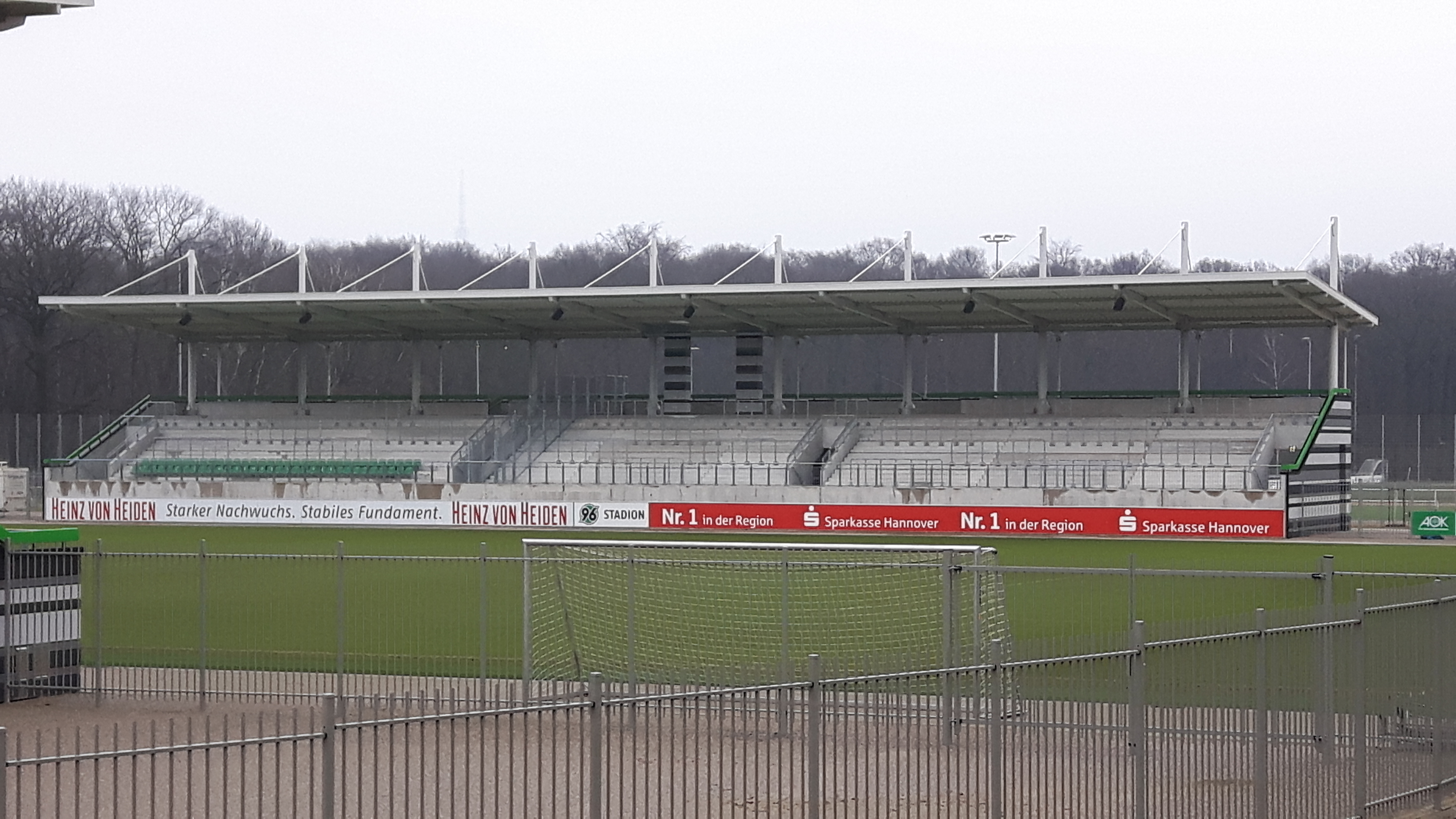 Haupttribüne im neuen Eilenriedestadion Hannover, 2018